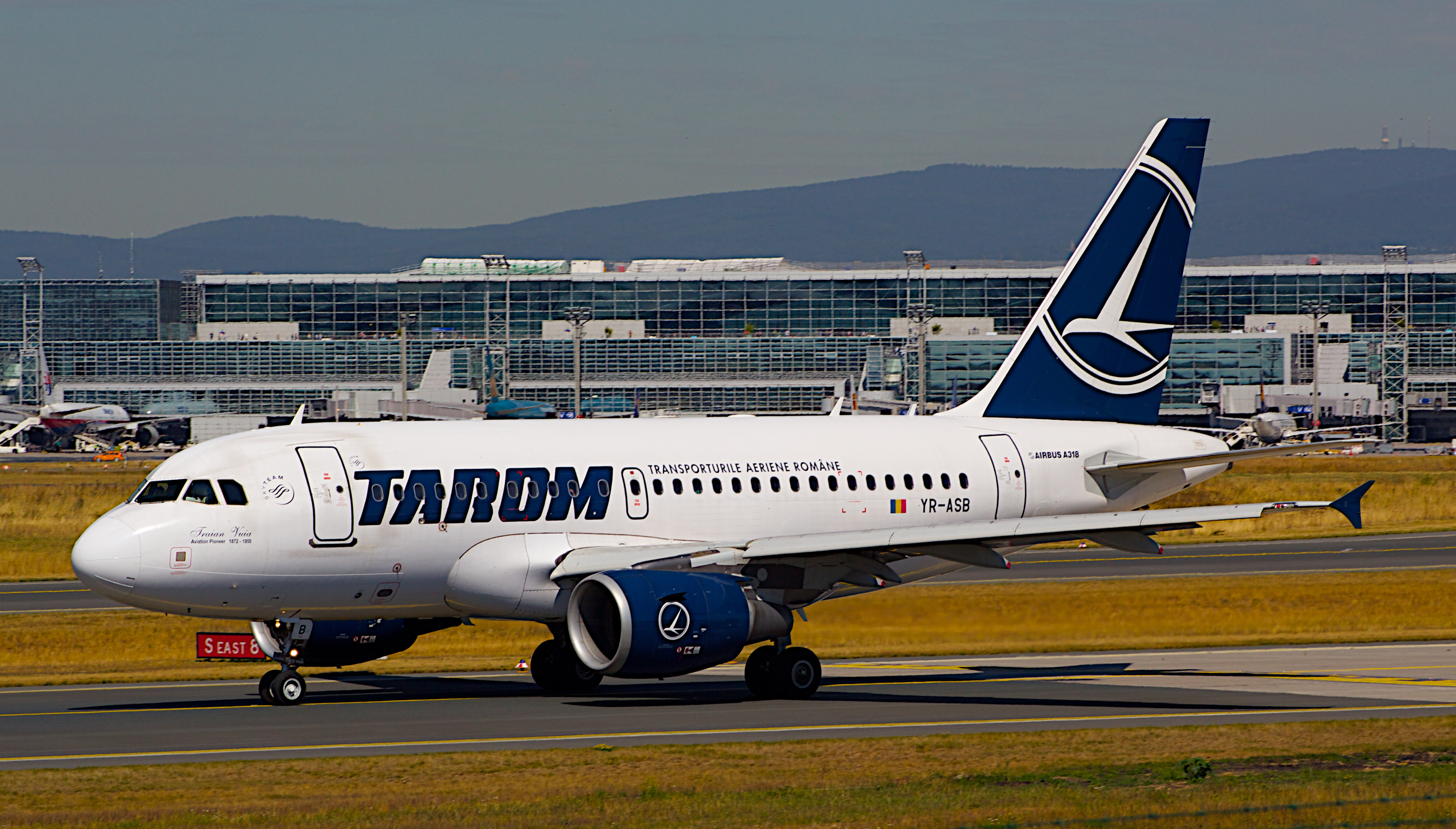 Tarom rollt zum Start.